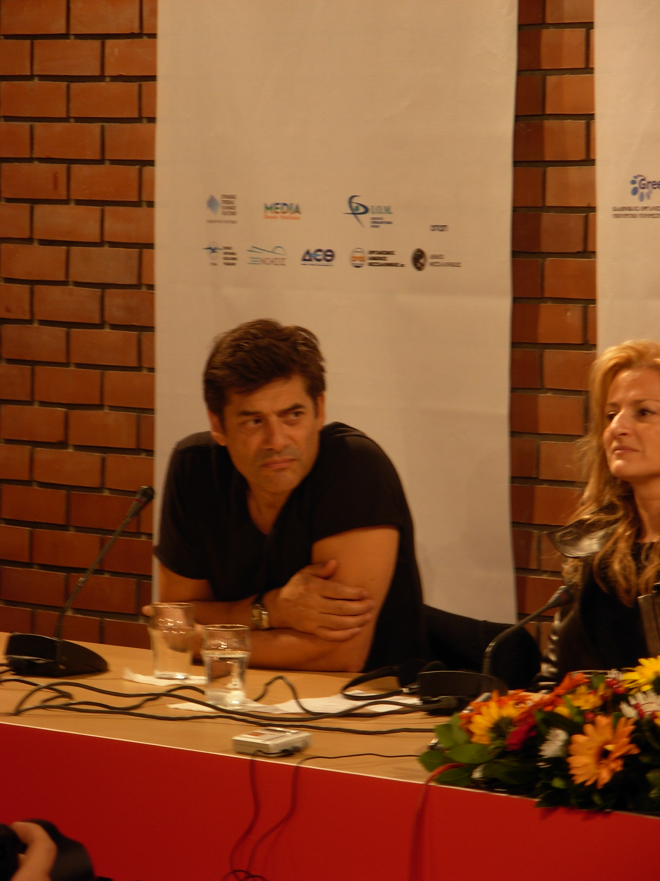 Georges Corraface durante el Thessaloniki International Film Festival en 2007, del cual fue el presidente.